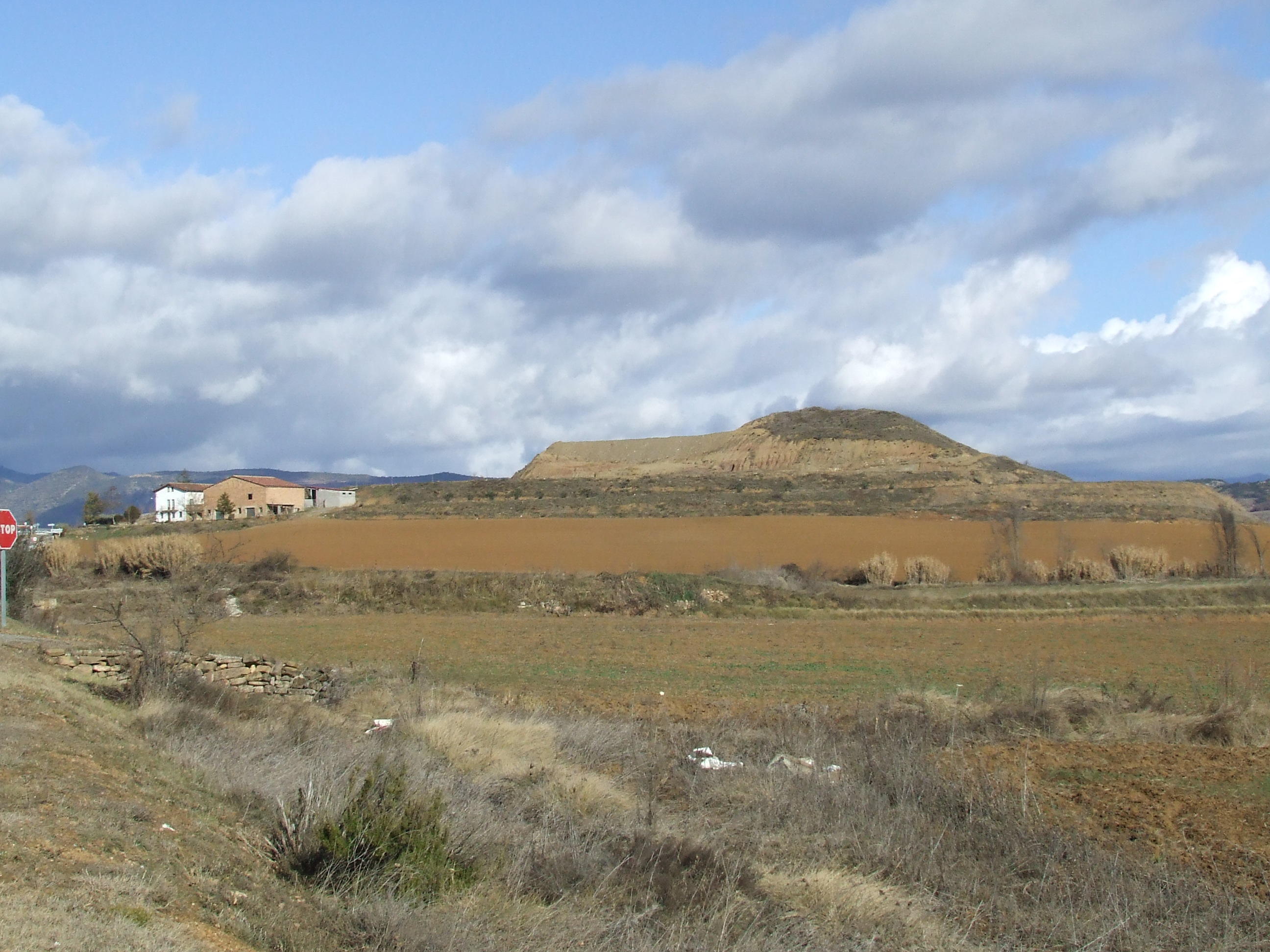 L'antiga quadra, ara masia, d'Alta-riba (Talarn, Pallars Jussà)